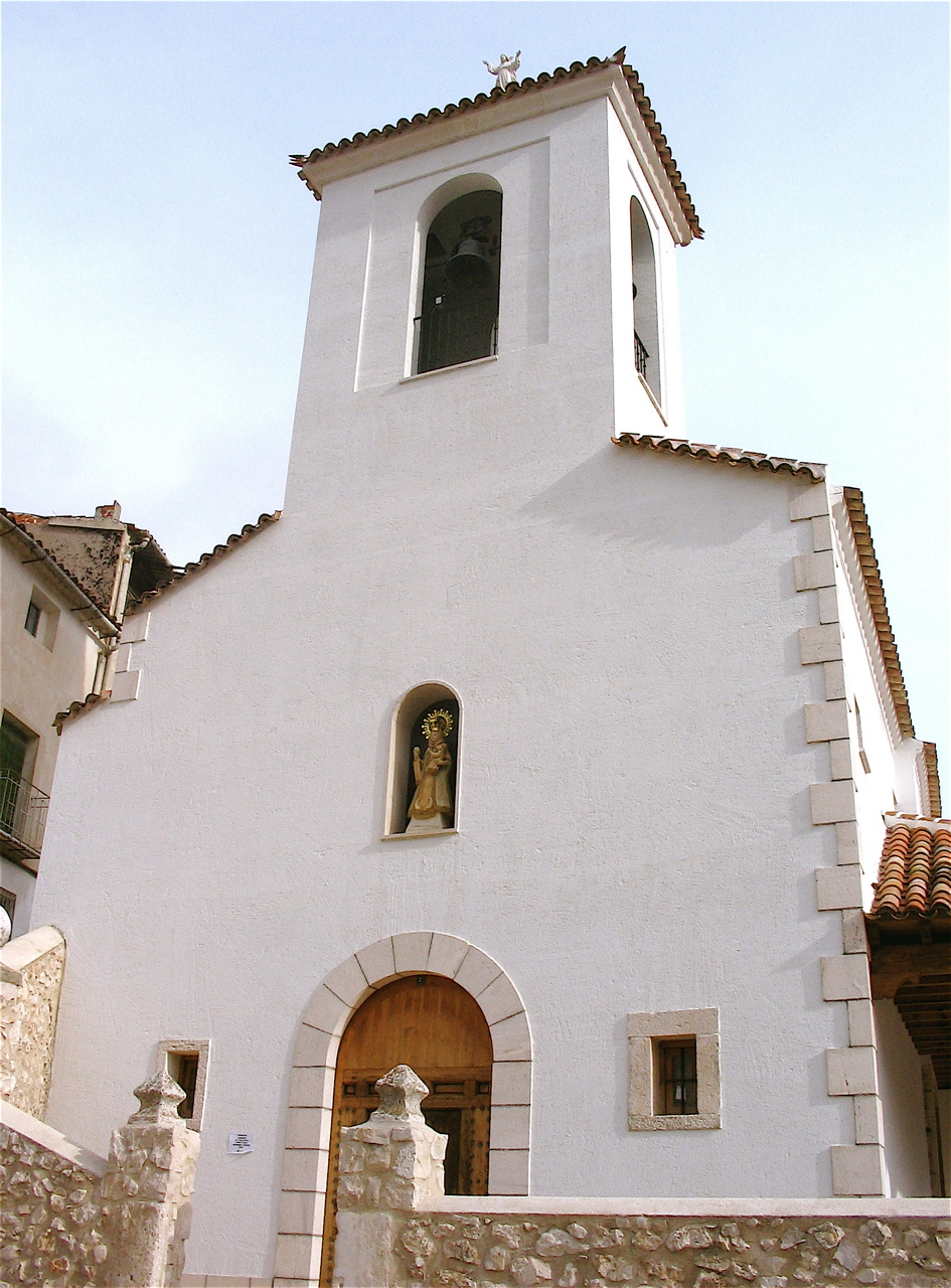 Torre de la iglesia parroquial de Nuestra Señora de la Asunción tras su reedificación en 2002. Valdelaguna. Madrid. España. Autor:MGR